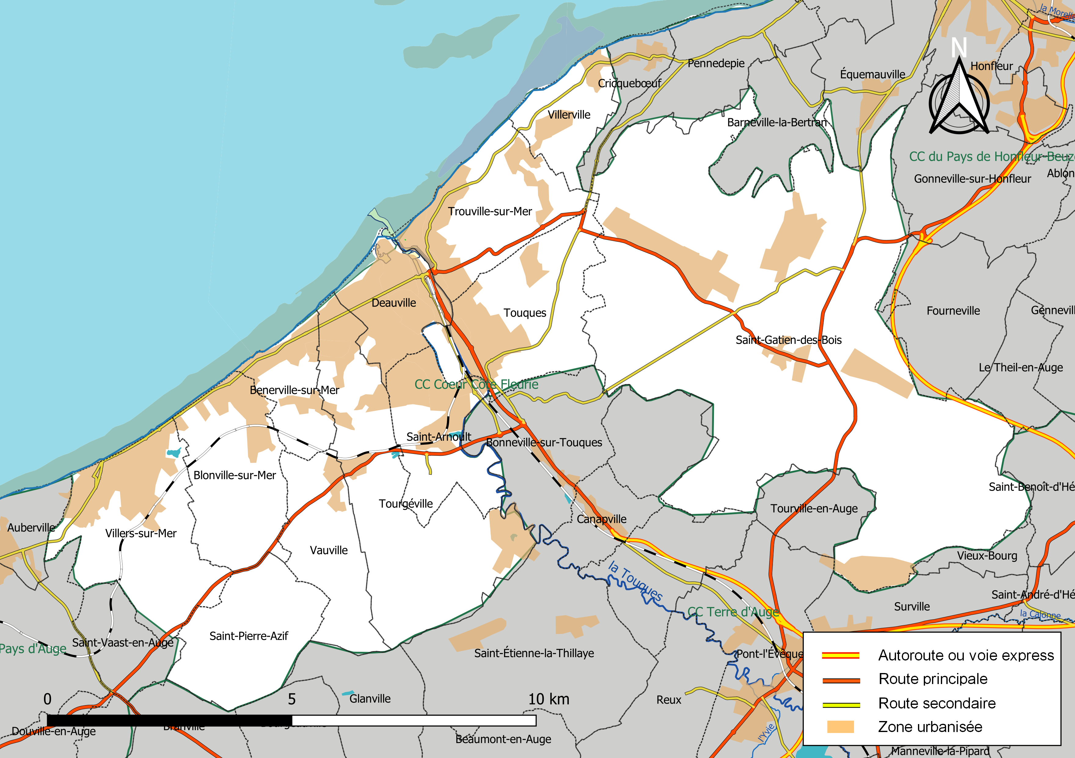 Carte géographique de la Communauté de communes Cœur Côte Fleurie, département du Calvados, France. Composition au 1er janvier 2019.